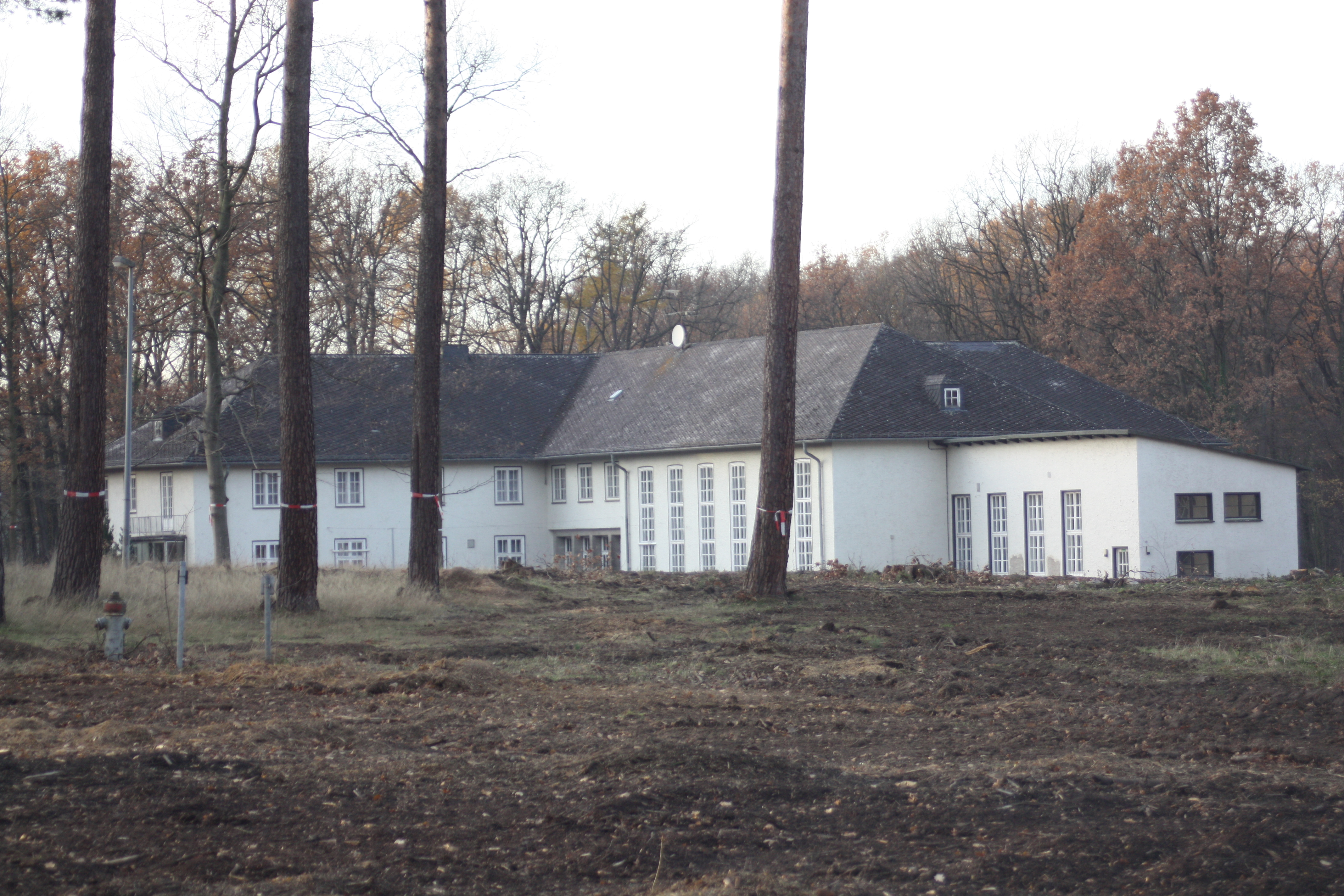 Fliegerhorst Goslar, Offizierskasino